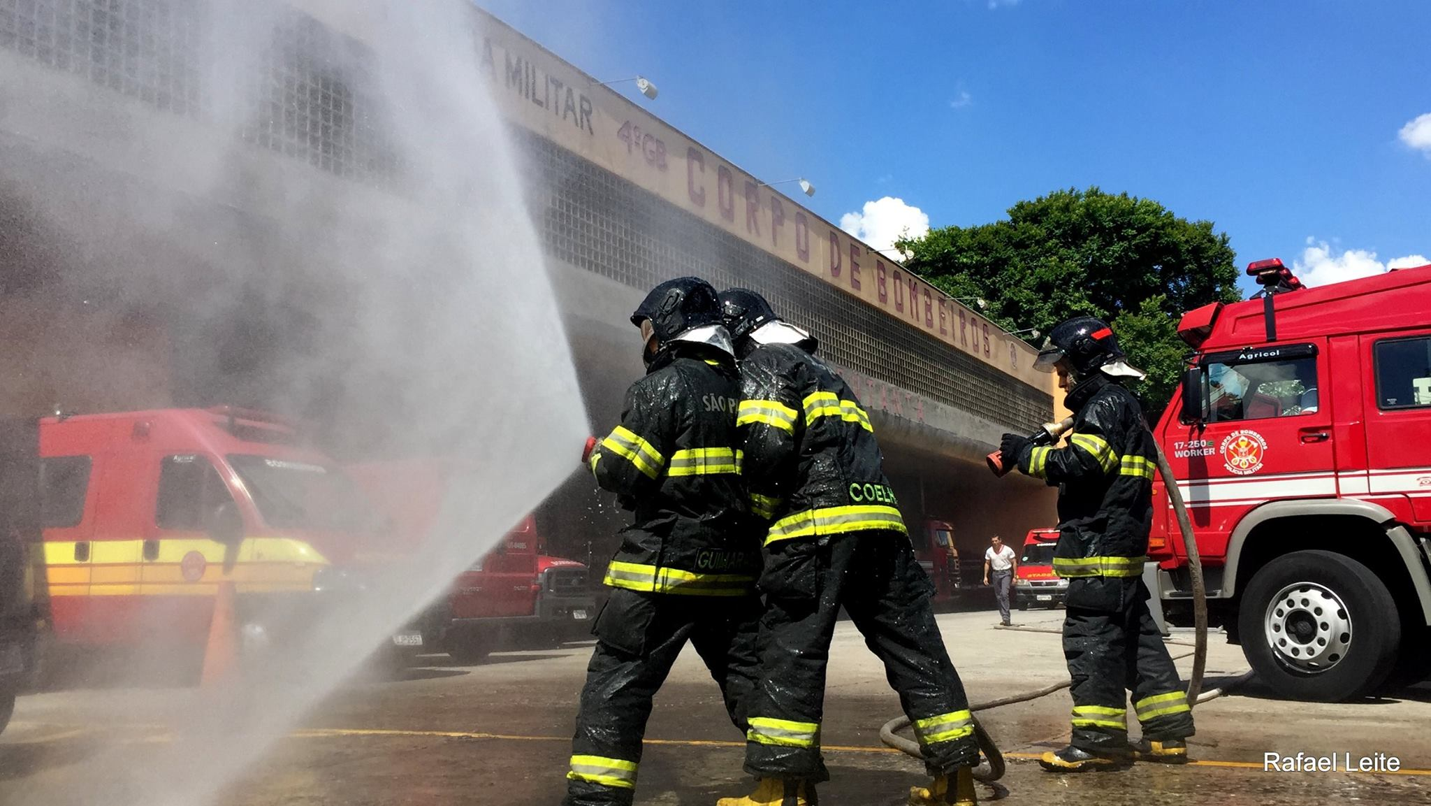 Treinamento de combate a incêndio no PB Butantã